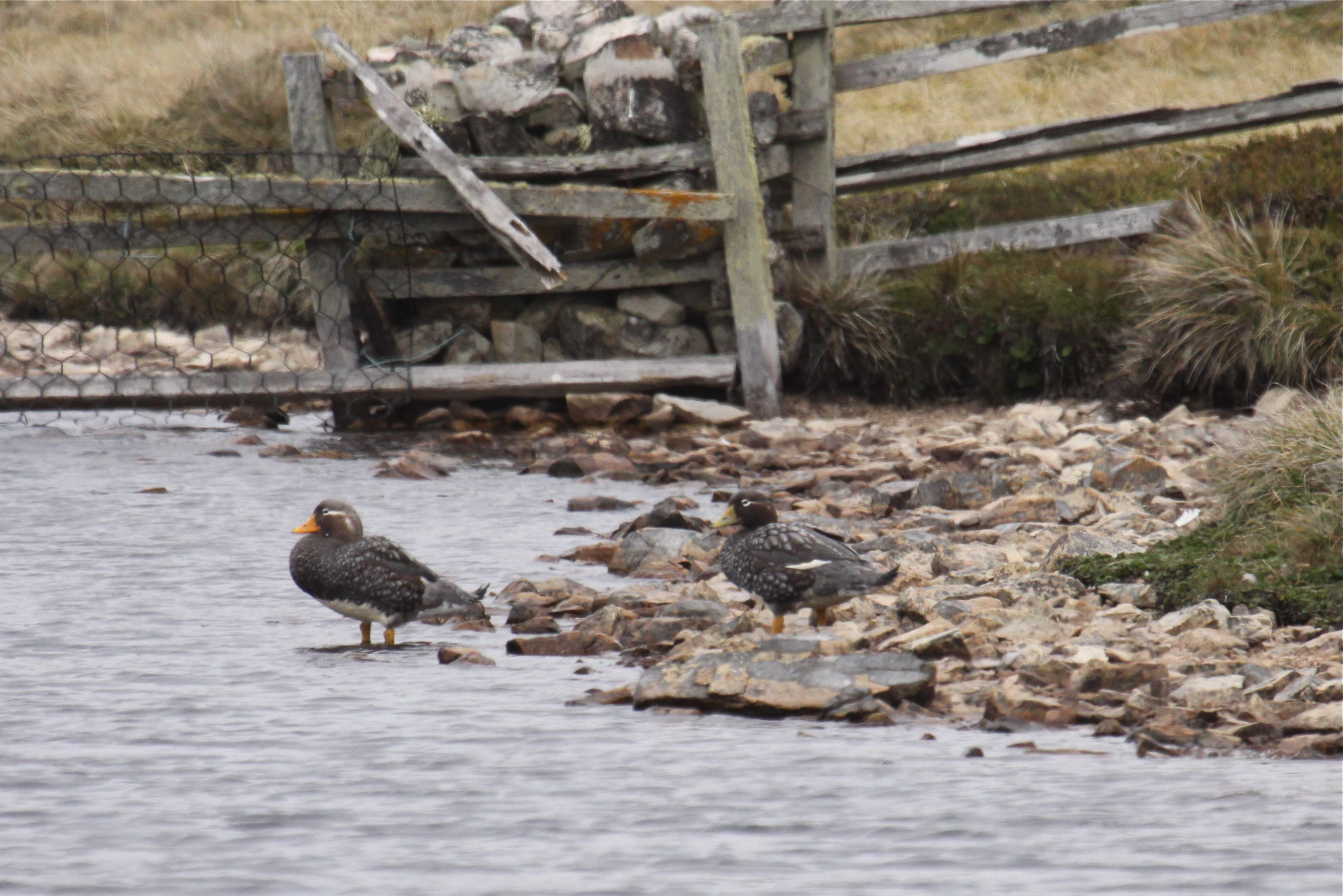 Falkland Flightless Steamer Duck (Tachyeres brachypterus)